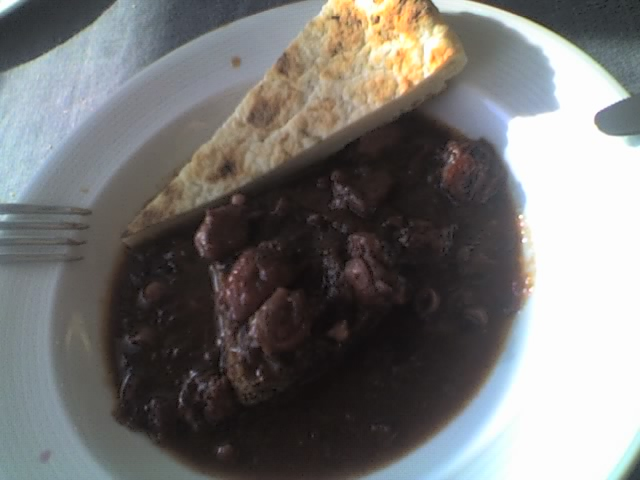 Portuguese cuisine - Alcatra com massa sovada (Azores)